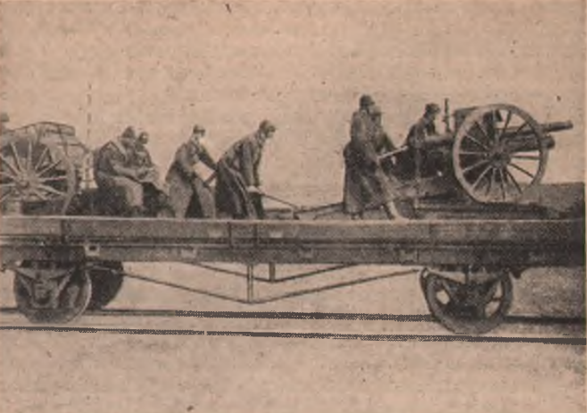 Гарматний відділ на потягу під час бою з більшовиками.